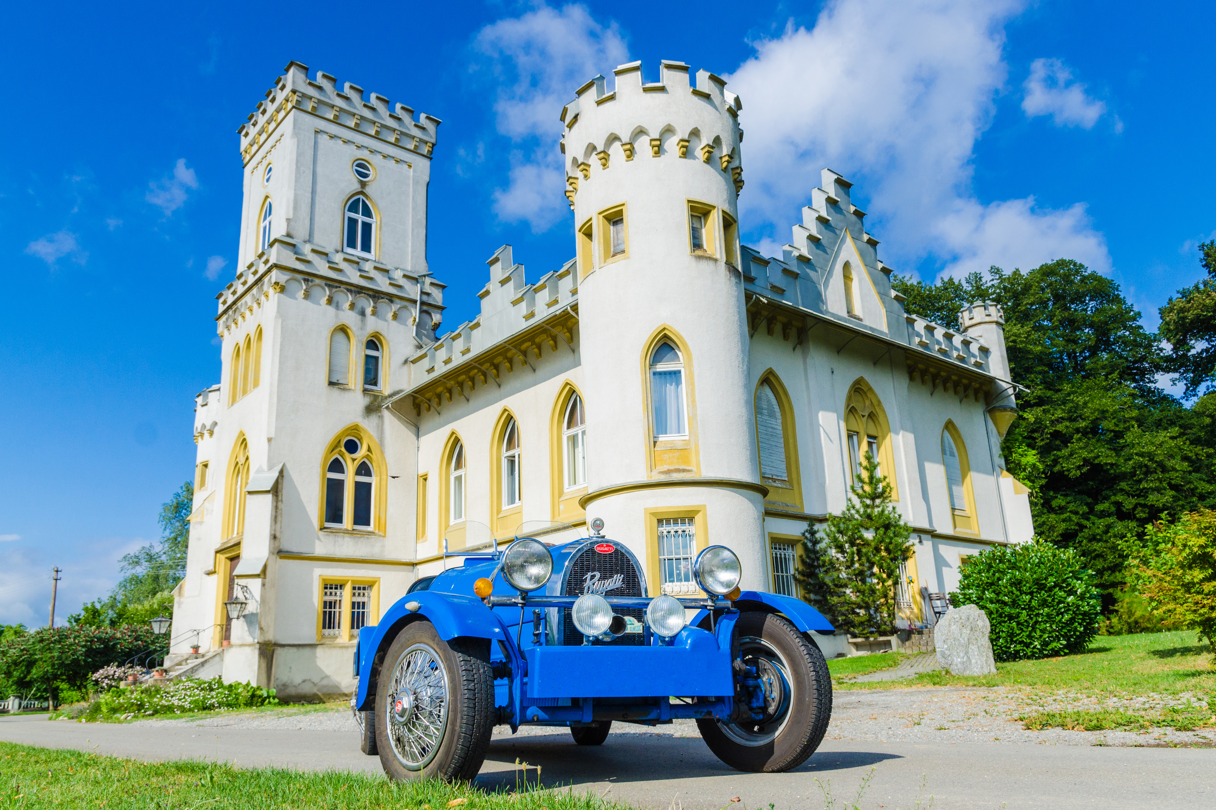 Schloss Benzenhofen 07.2015